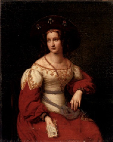 Bildnis der Schwägerin Friedrich Wilhelms von Schadows Johanna von Sydow geb. Groschke (* 16. August 1810; † 9. Dezember 1872) im Renaissancekostüm, Öl auf Leinwand, 36.5 x 29 cm